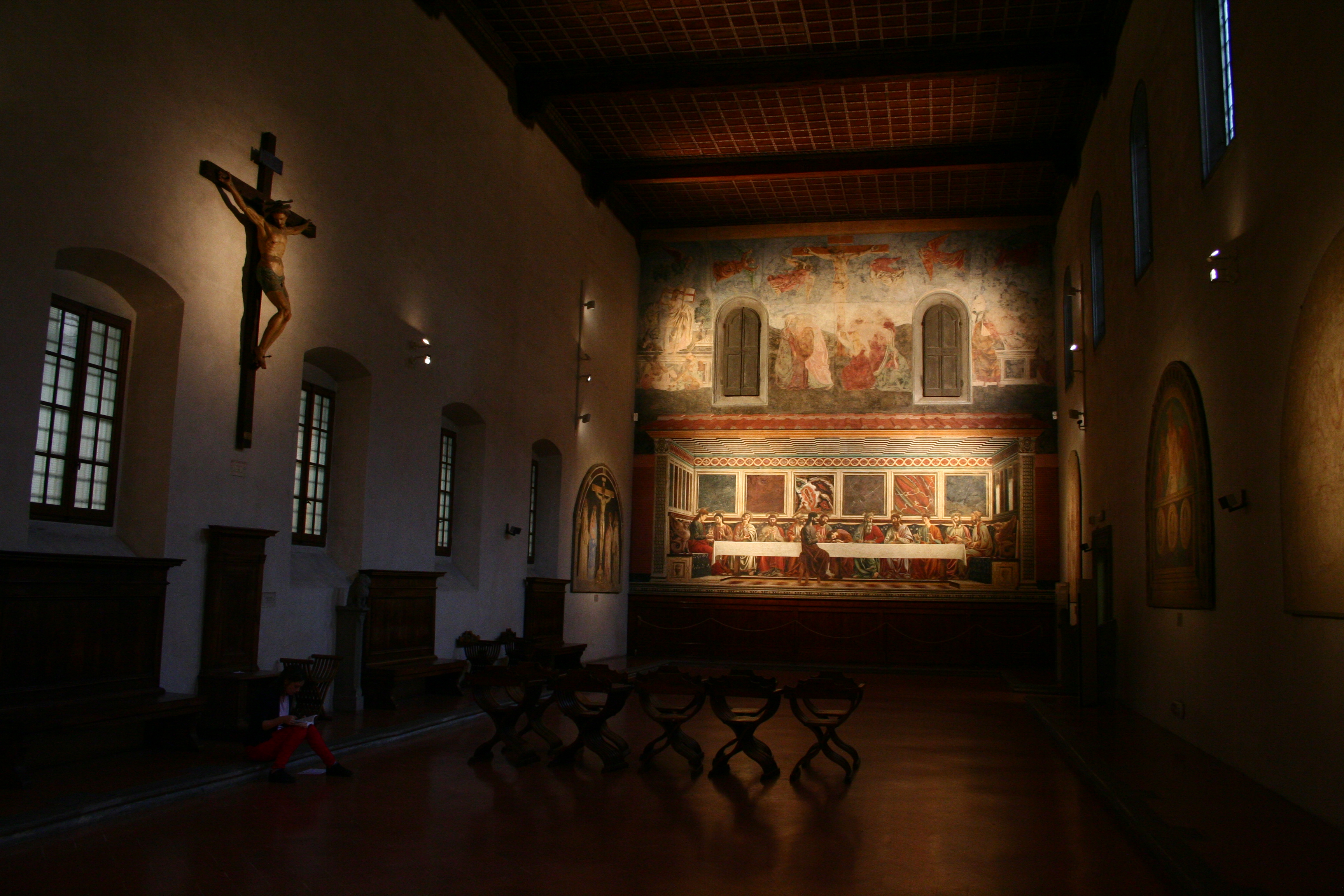 Cenacolo di Sant'Apollonia (réfectoire)